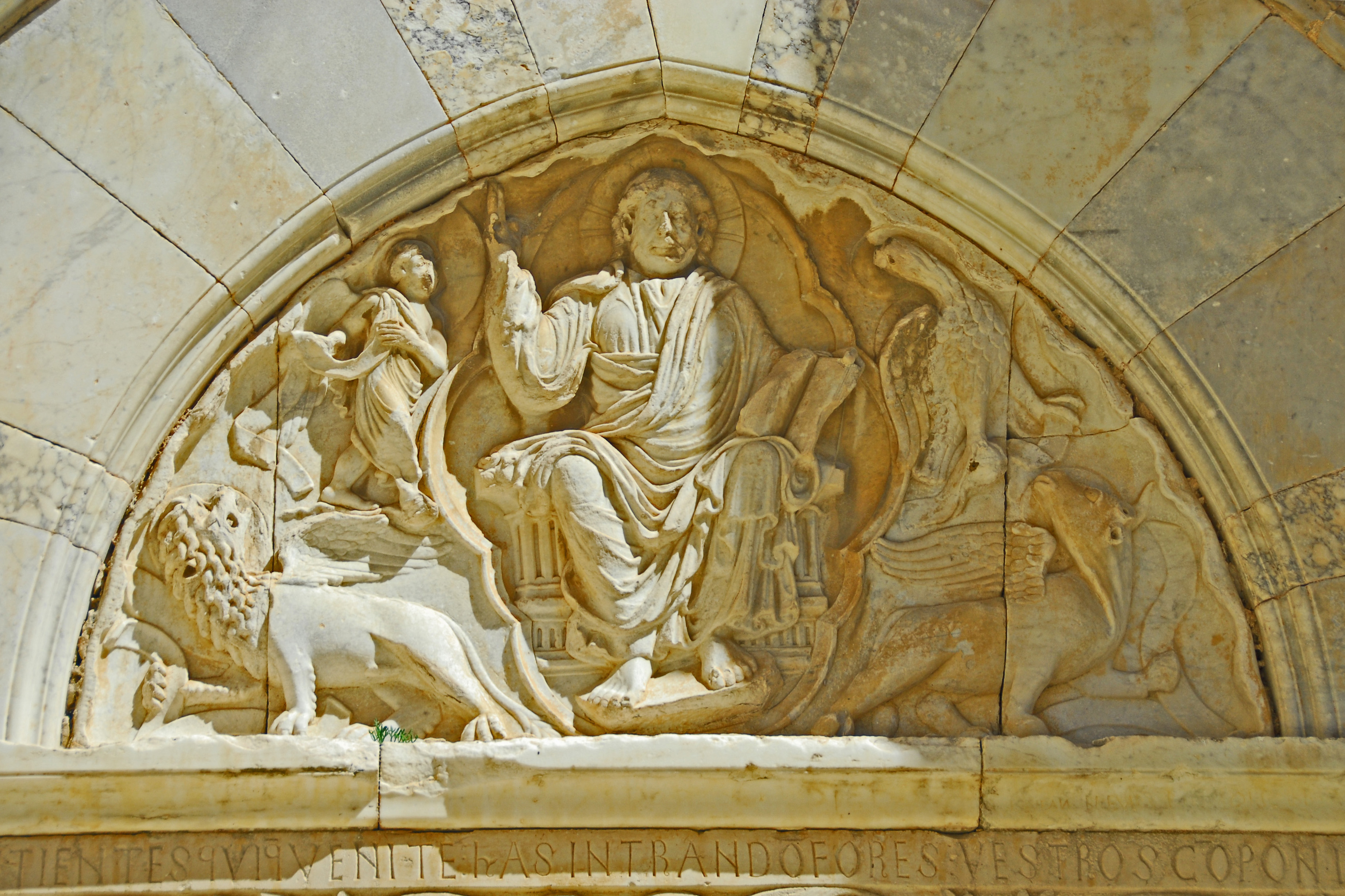 St-Pierre-et-St-Paul de Maguelone, Hauptportal, Tympanon